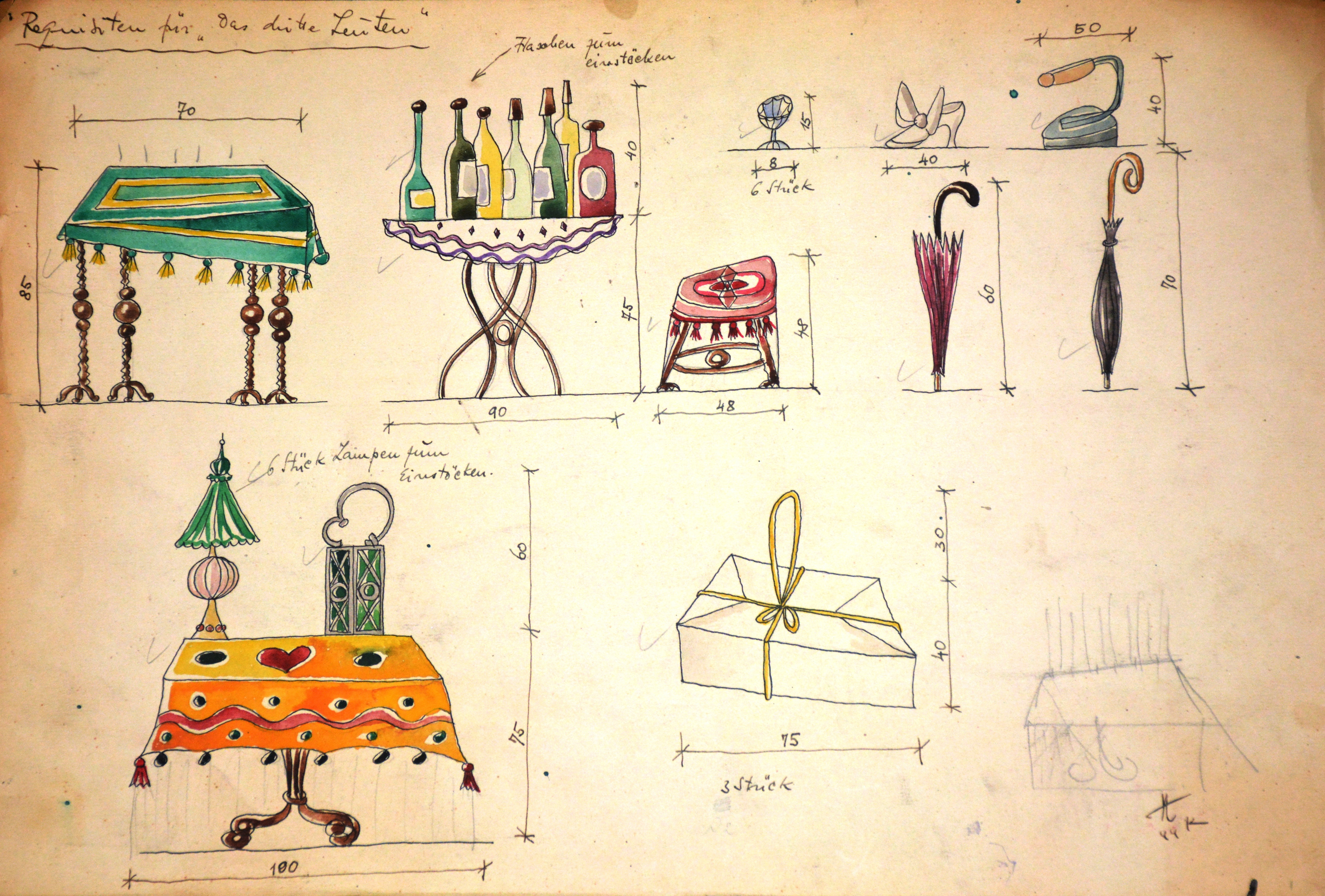 Návrh divadelních rekvizit pro divadelní představení v Koncentračním táboře Terezín (Ghetto), datováno 1944 (autor: Ing. arch. František Zelenka, 1904-1944)